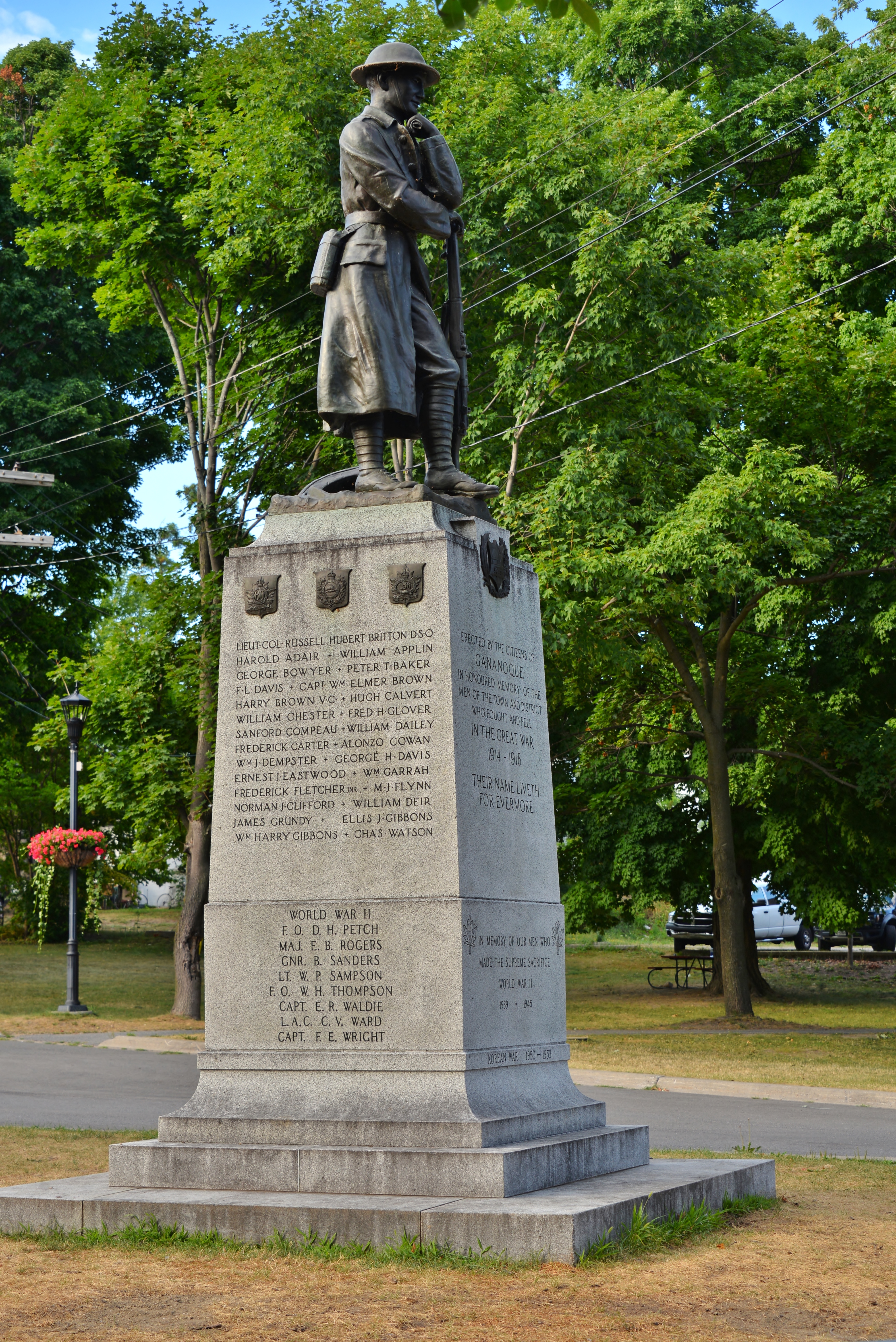 Пам'ятник полеглим у війнах навпроти ратуші Ґананокве. На пам'ятнику фігура 19-річного юнака Геррі В. Брауна, який, отримавши важкі поранення під артилерійським обстрілом коло Вімі Рідж, все ж приніс важливе повідомлення, яке врятувало життя багатьом солдатам. Нагороджений посмертно Хрестом Вікторії